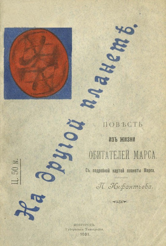 Перше видання повісті (1901 рік)